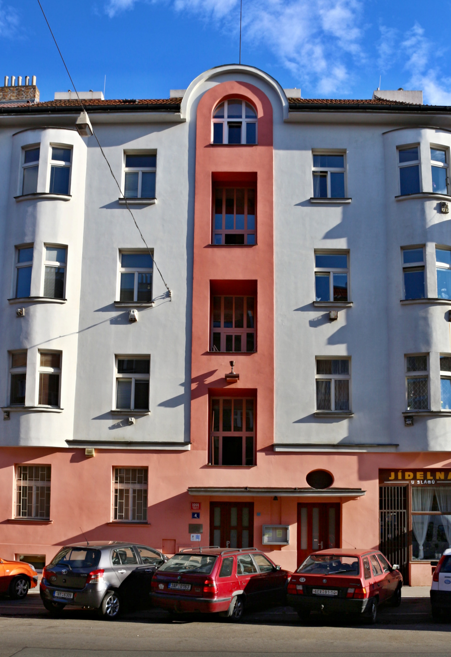 Farní sbor ČCE v Praze 10-Strašnicích